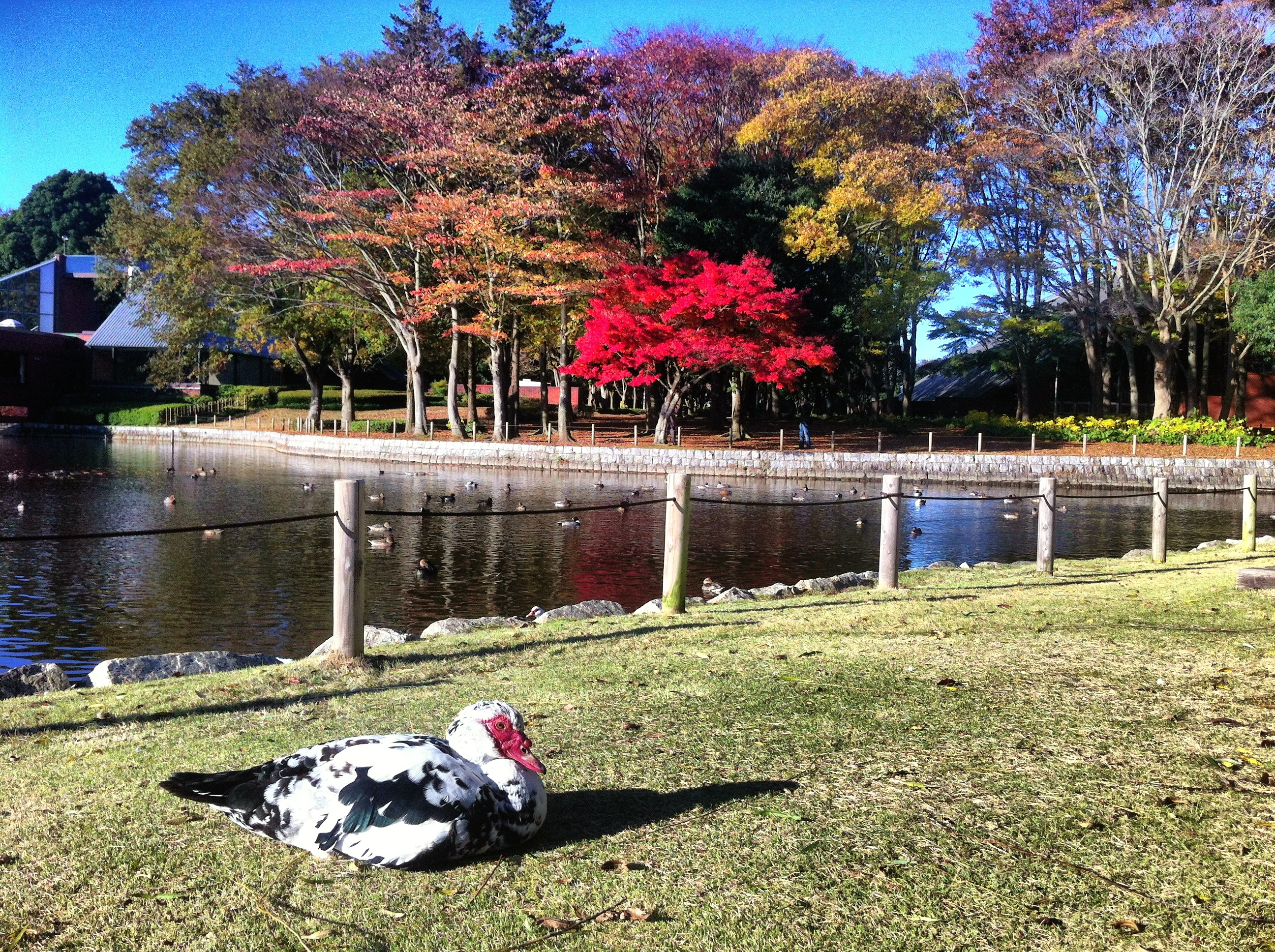 茨城県つくば市にある洞峰公園。左下の鳥はバリケン。